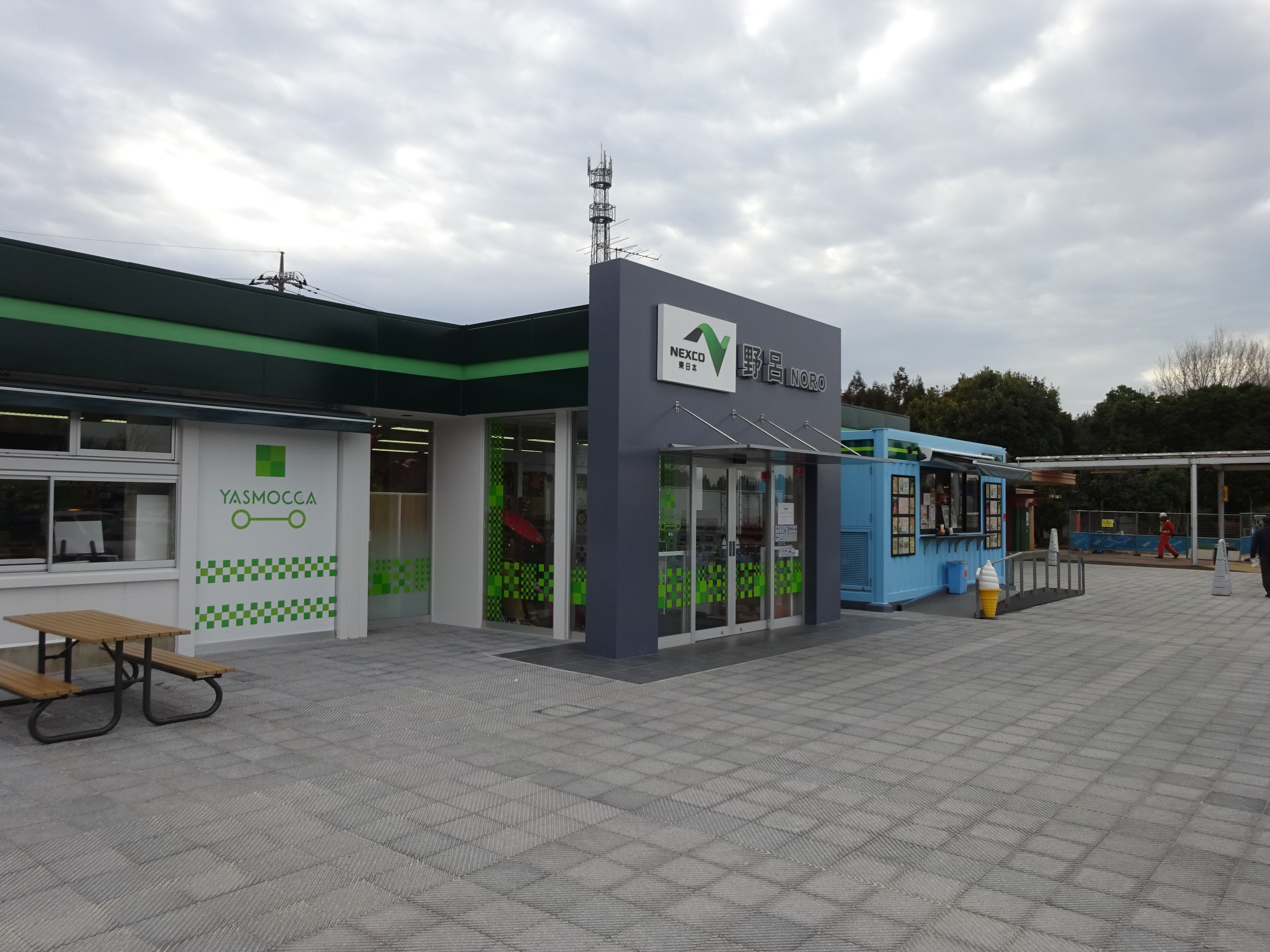 野呂パーキングエリア上り線施設（2020年2月）